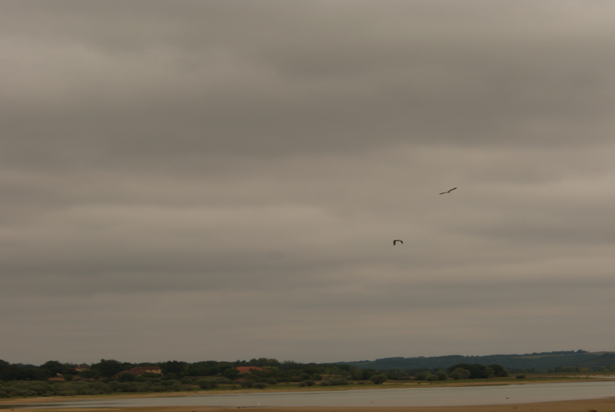 Zicht op het Réservoir L'Astarac.